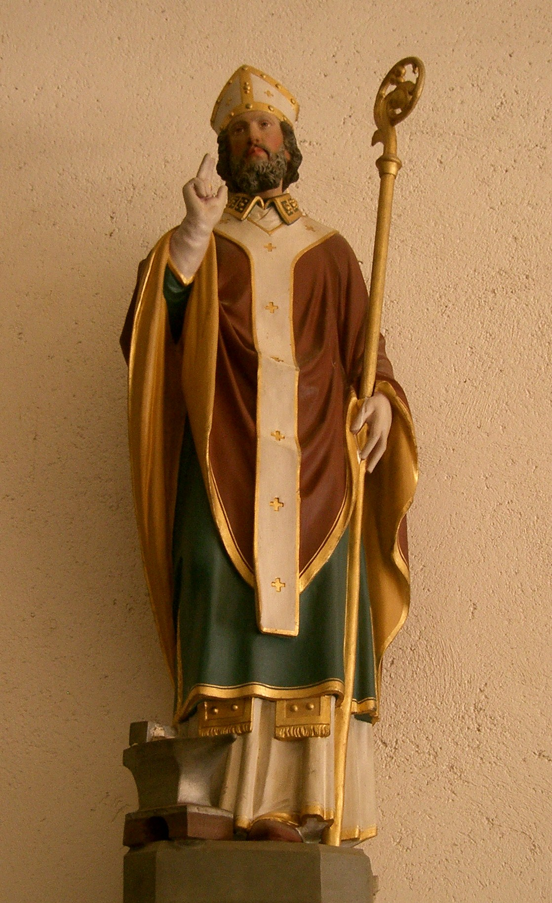 statuette de Saint Léger (XIXe siècle) - église de Chivres (Côte d'Or – France)